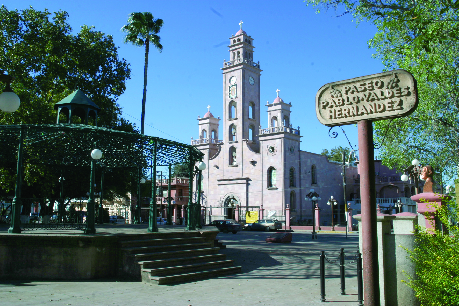 Santuario de Nuestra Señora de Guadalupe, Piedras Negras, Coahuila/ Nuestra Señora de Guadalupe sanctuary